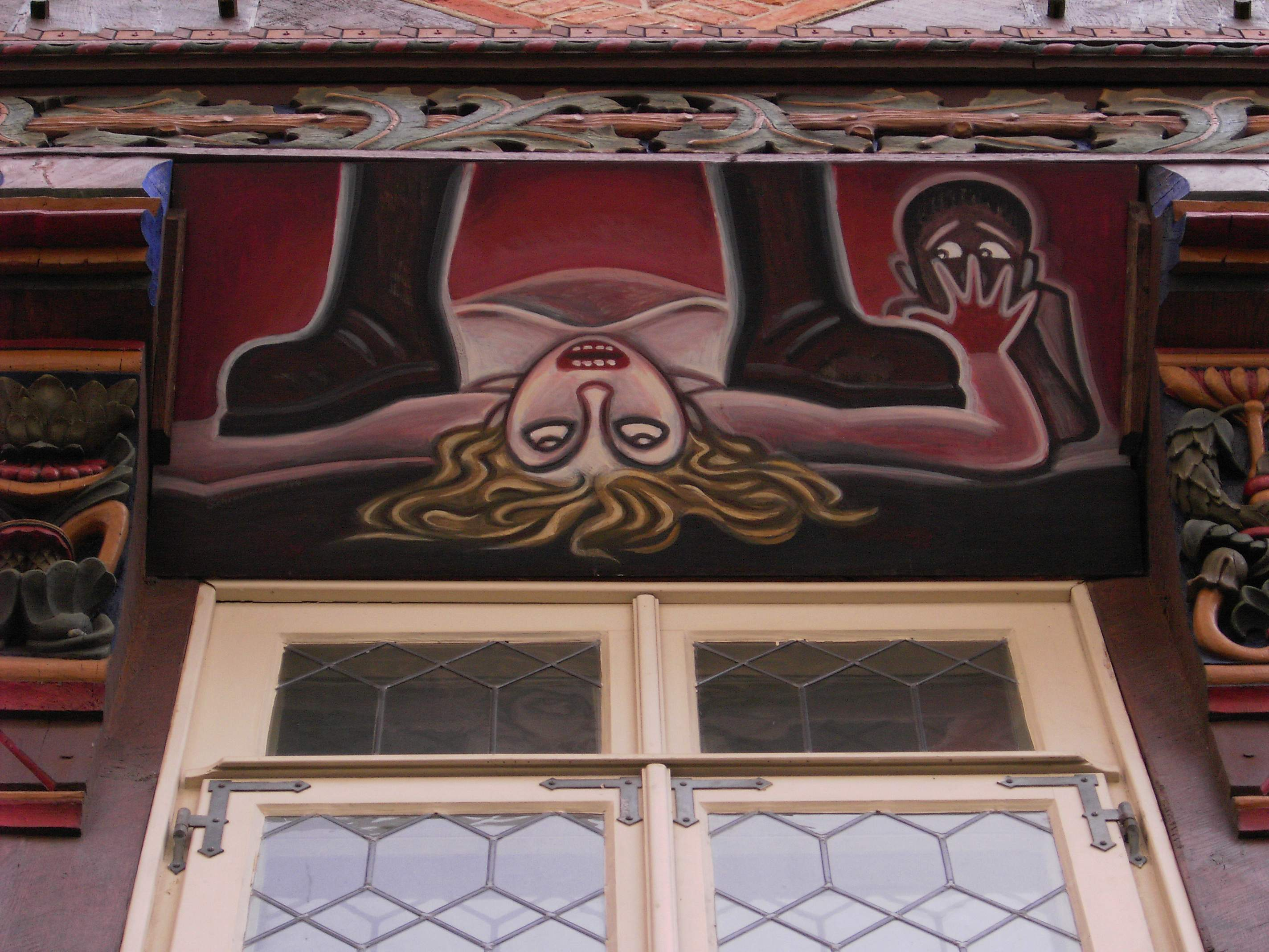 Hildesheim, Knochenhaueramtshaus, Side, Detail